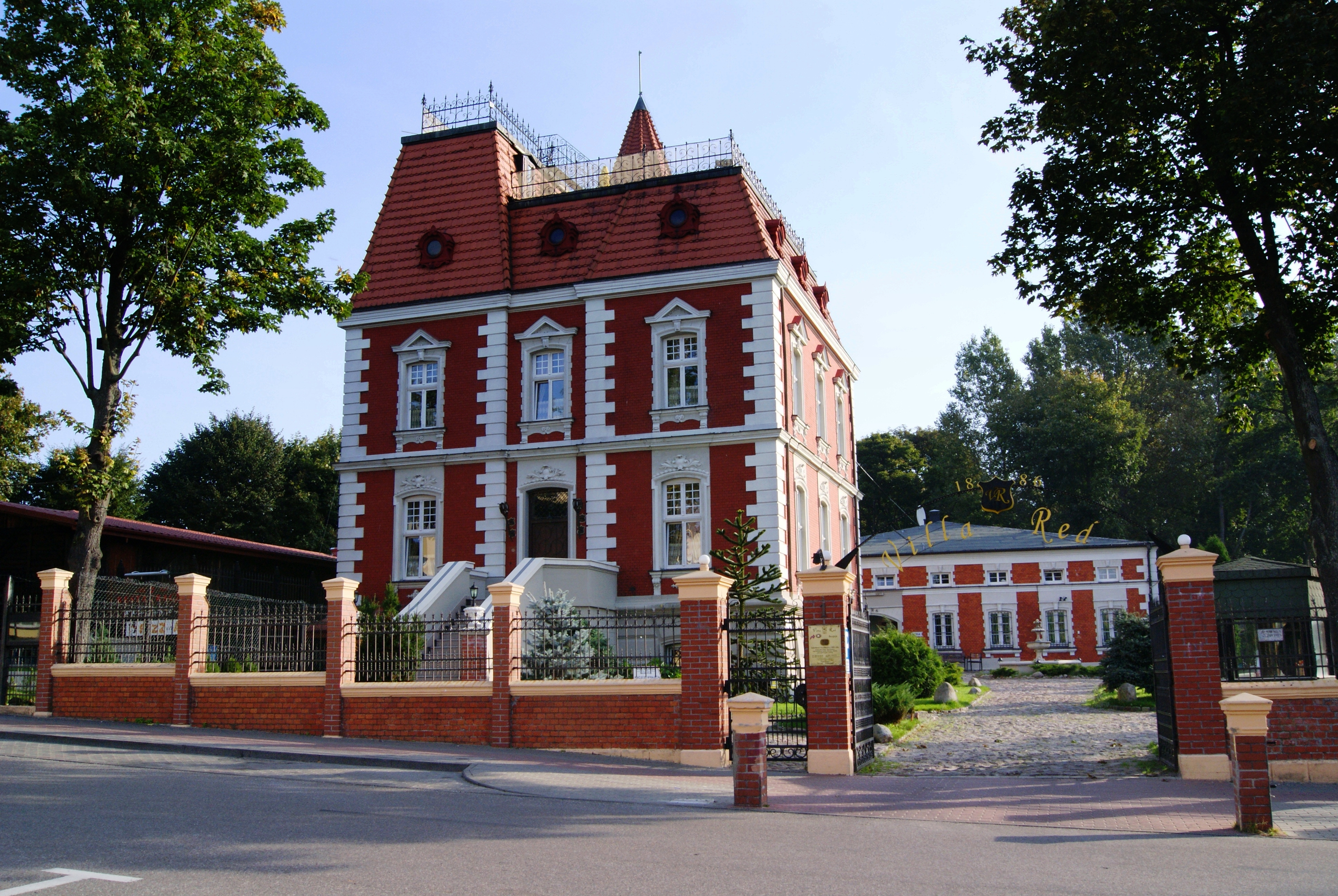 Ustka, ul. Żeromskiego 1 - willa, 1900